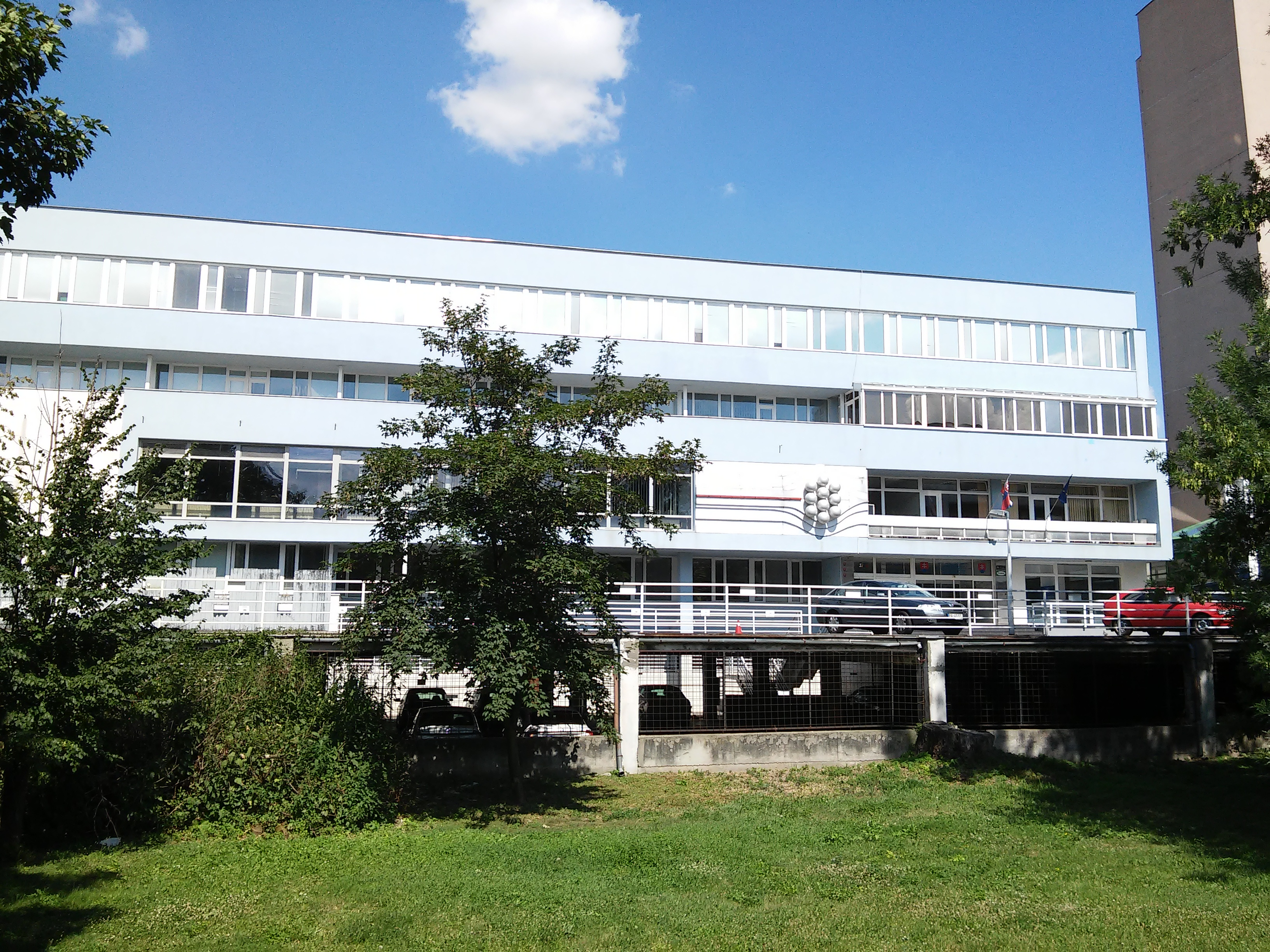 Bajkalská, Ružinov, Bratislava